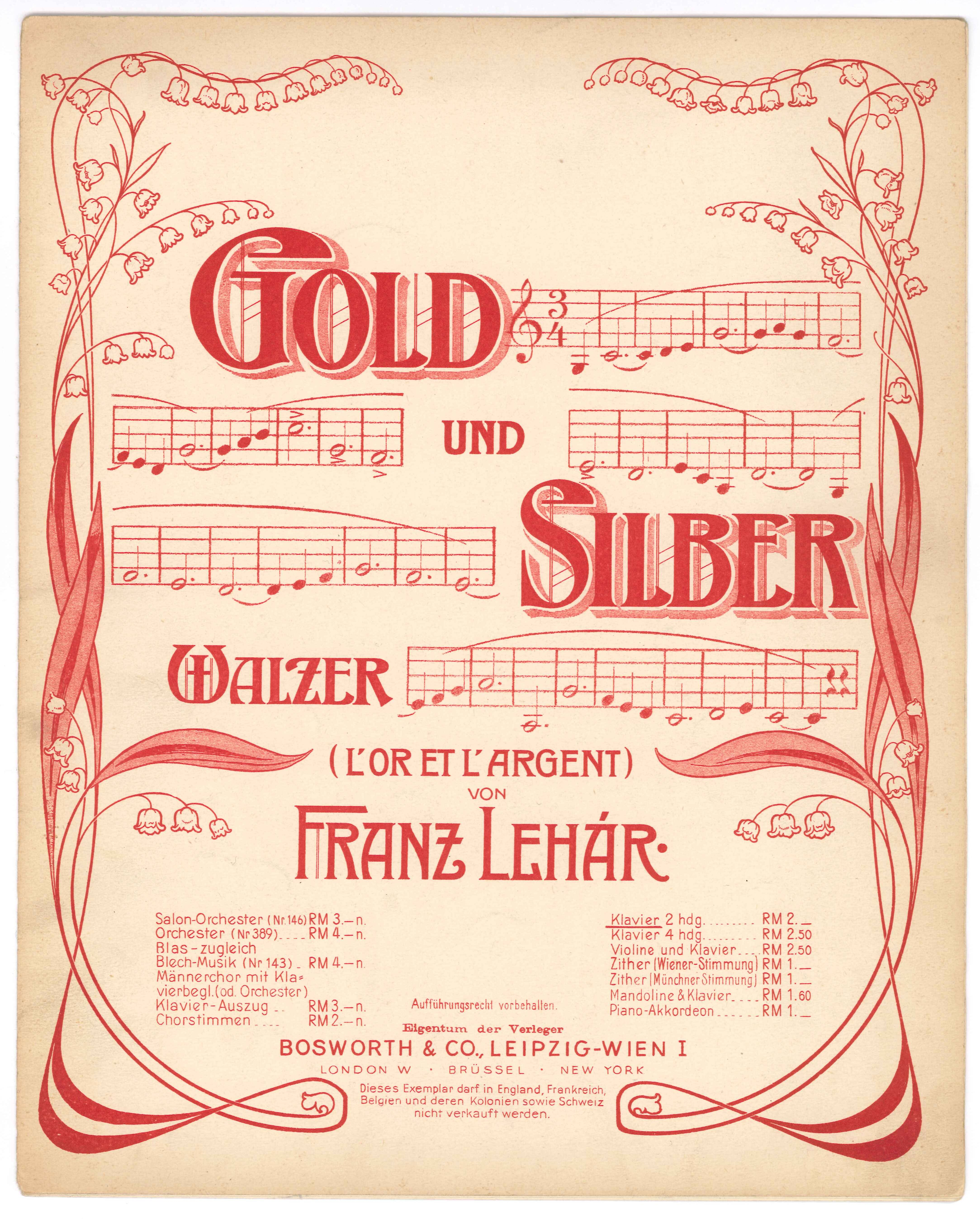 Franz Lehár (1870–1948): Gold und Silber op. 79, Walzer für Orchester (1902) Titelblatt; Musikverlag Bosworth & Co, Wien